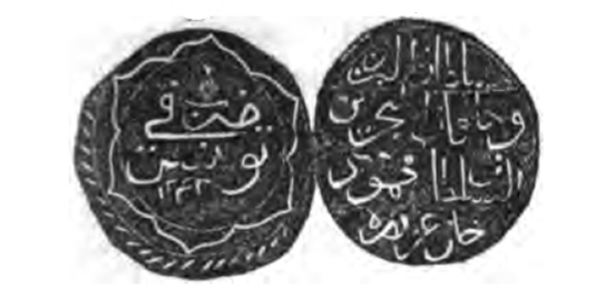 Monnaie tunisienne (le rial tunisien) frappée en 1827 (et non 1808, car elle porte la date de 1243 Hégire = 1827 AD) sous le règne du sultan ottoman Mahmud II.